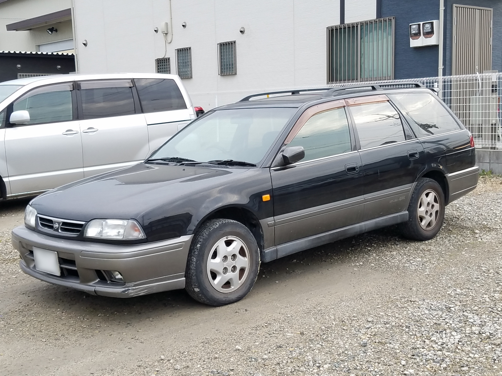 アベニール サリューX